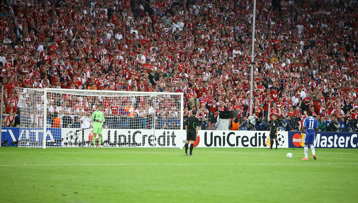 RA1_6425